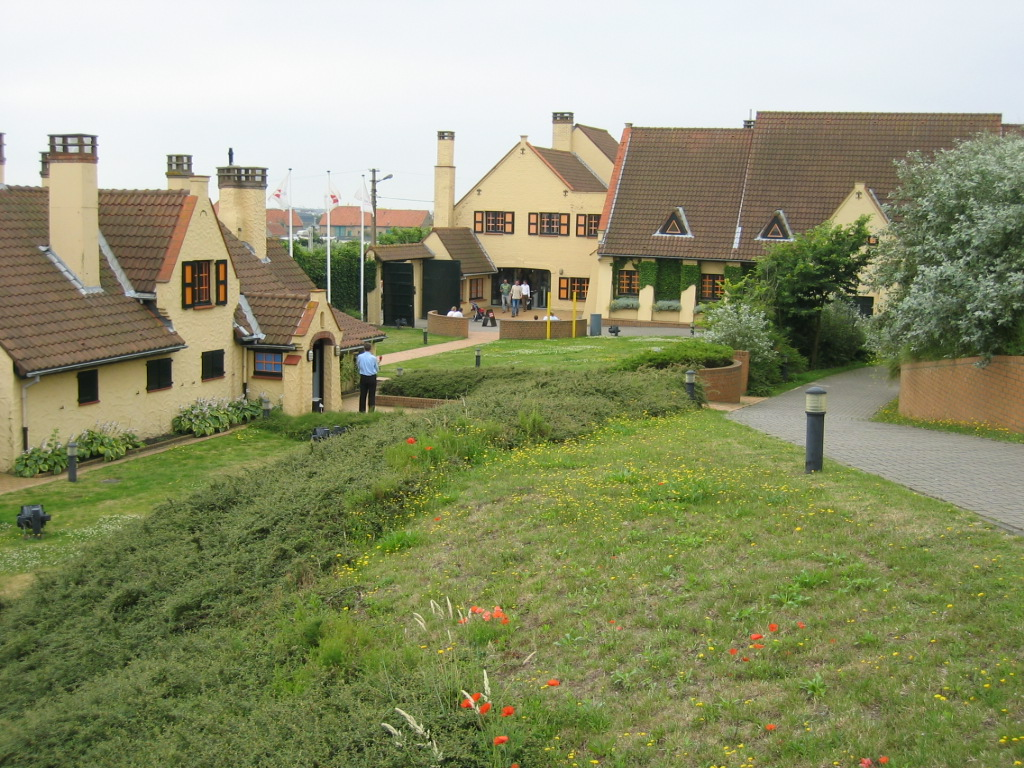 West-Vlams: Domin Raversiede bie Ostende